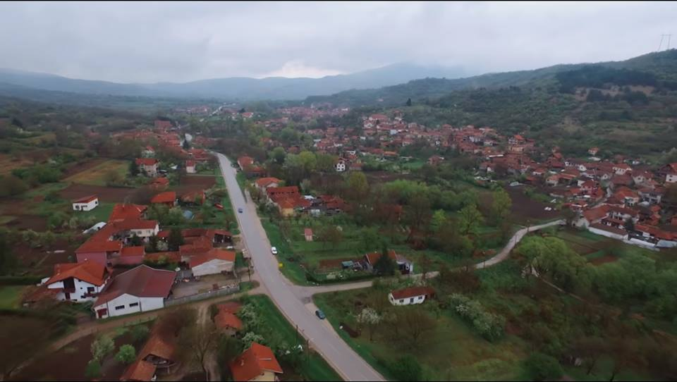 слика села малча из неба